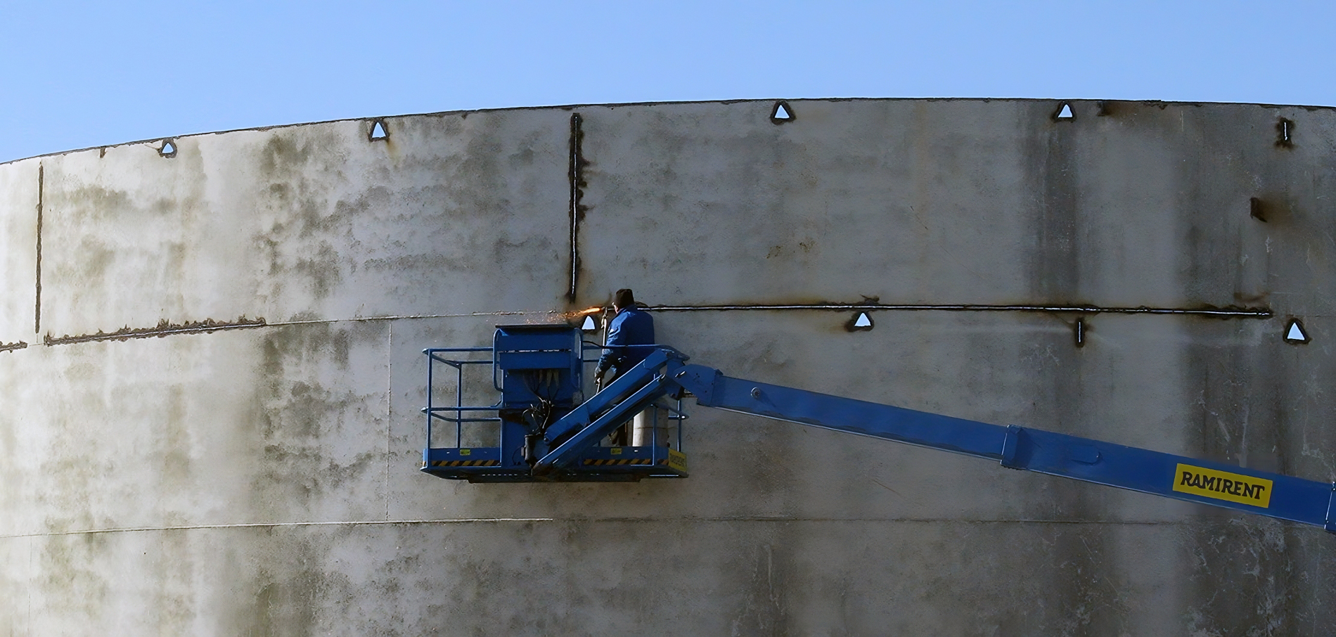 Skärbränning - Falk tanken - Ystad-2012